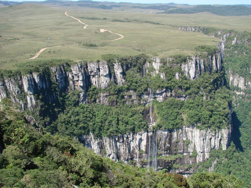 Vista dos paredões do Cânion Fortaleza, Parque Nacional da Serra Geral, Rio Grande do Sul - Brasil.